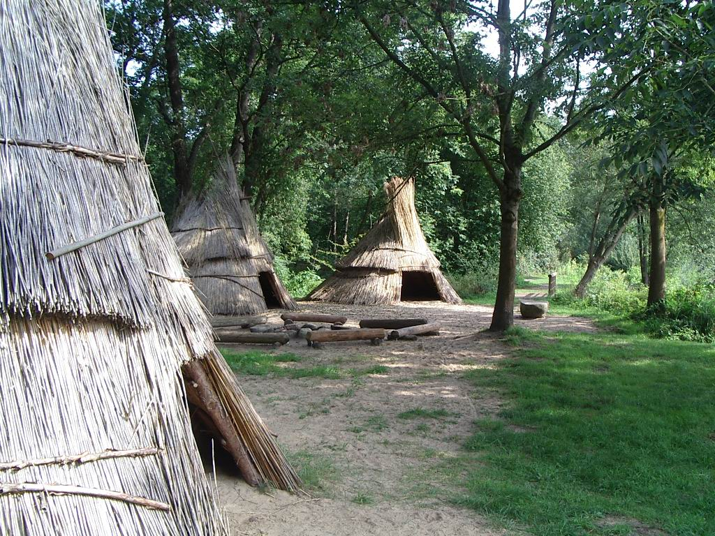 Rekonstruktion nach Ausgrabungsbefunden eines Hüttendorfes von Jägern und Sammlern der Mittleren Steinzeit, am Auesee, Bremervörde. Fotografiert von Benutzer:Geoz August 2006